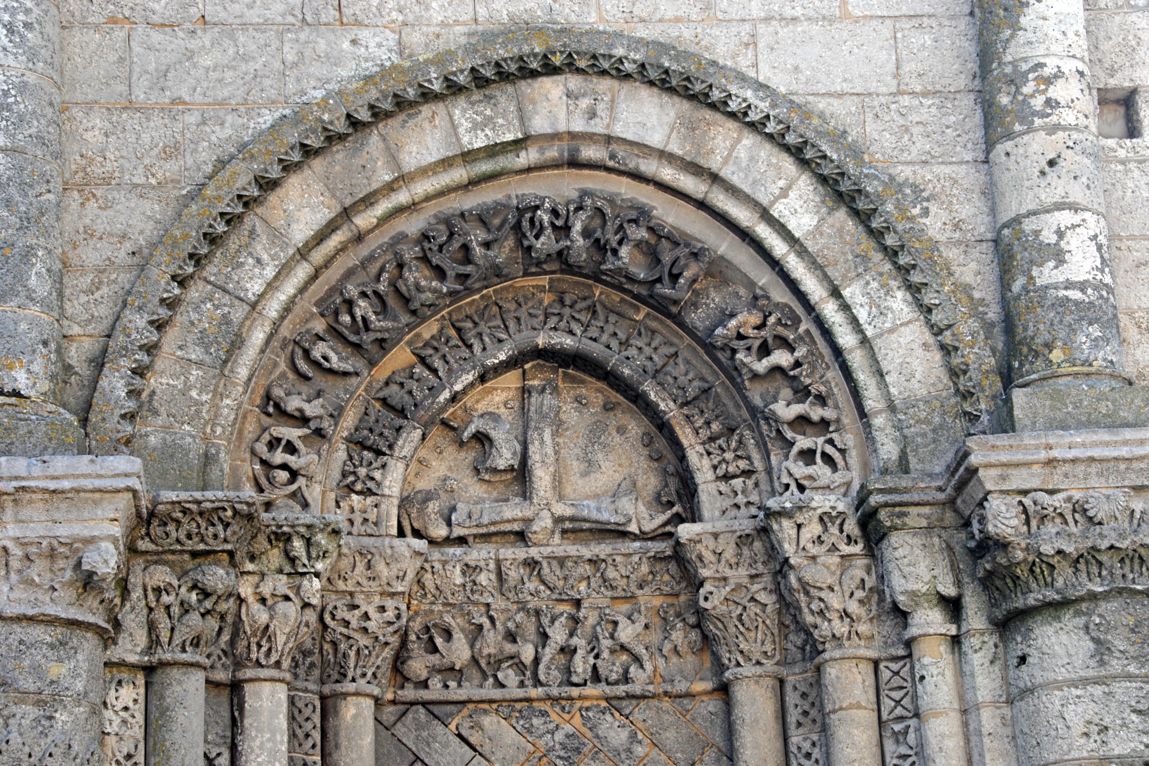 St-Pierre de Pont-l’Abbé-d’Arnoult (17), Archivolten-Blindportal, rechts